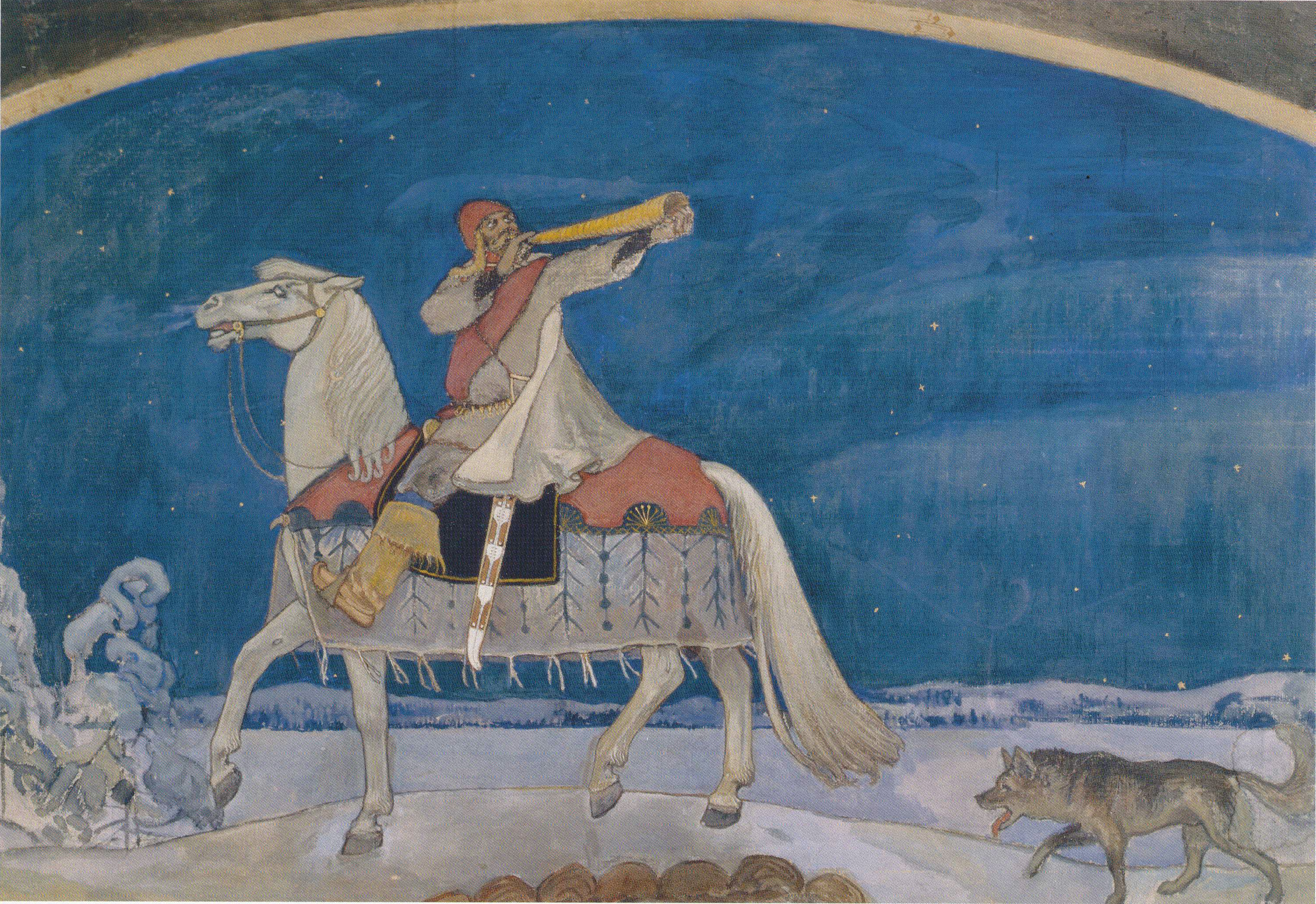 Akseli Gallen-Kallelan temperamaalaus Kullervon sotaanlähtö. Kuuluu Ateneumin kokoelmiin. Gallen-Kallela teki samasta aiheesta freskon Helsingin ylioppilastaloon.